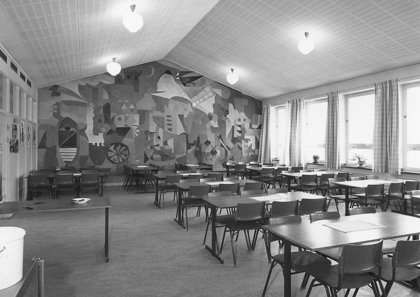 Bandhagens skola. Byggår 1955 - 1973. K. Herlin (Trädgårdsarkitekt), Stockholms Folkskoledirektion (Byggherre), Sture Frölén (Arkitekt), Svenska Väg Aktiebolag (Byggmästare)